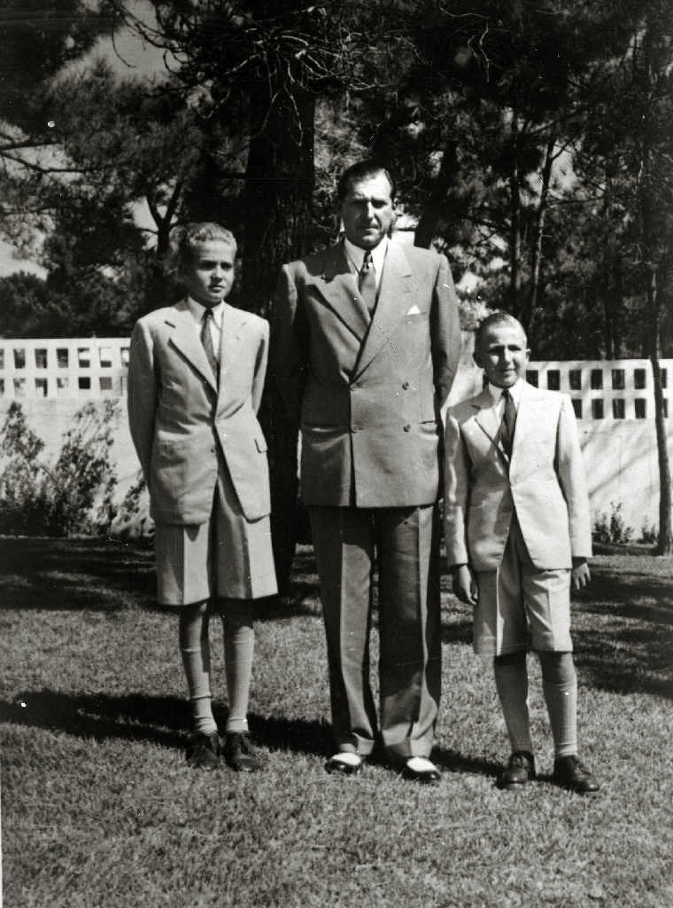 Título original: Juan Carlos de Borbón junto a su padre y su hermano Alfonso (1/1) Localización: Guipúzcoa